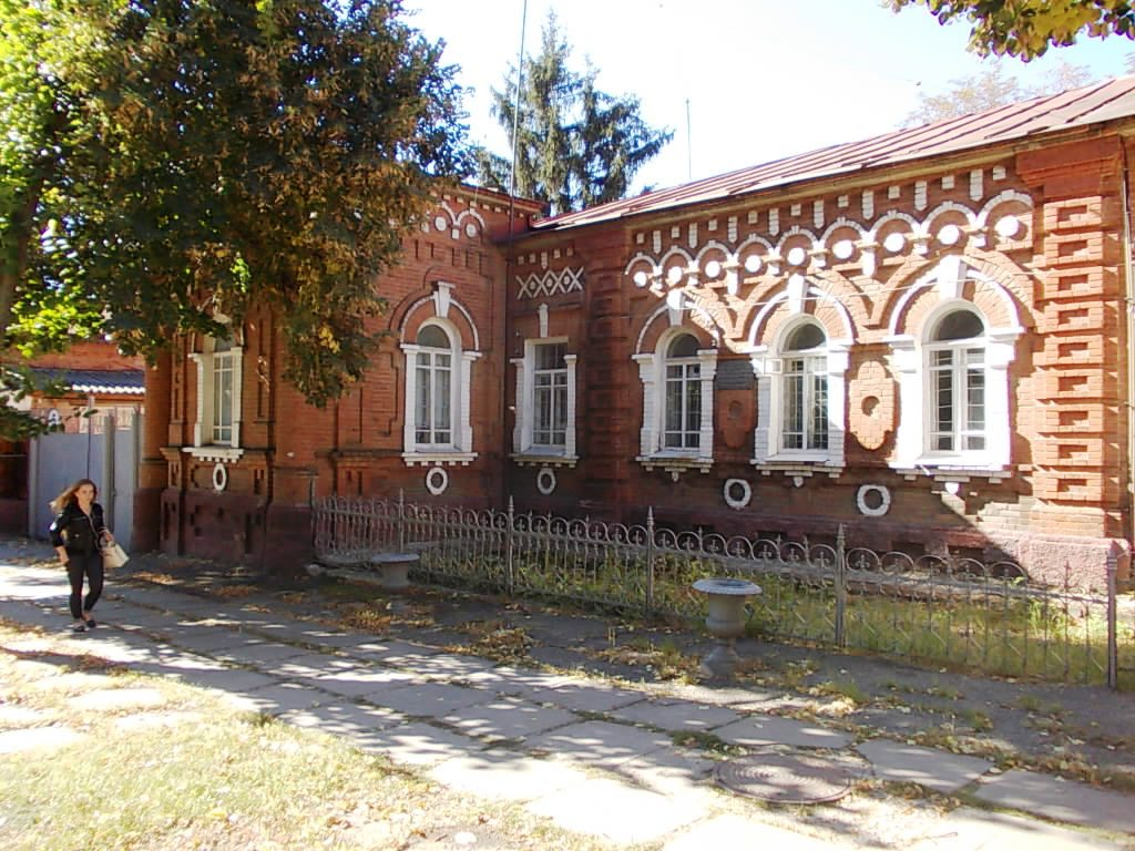 Будинок, де був розташований штаб 38-ї армії під командуванням К. С. Москаленка, Куп'янськ, вул. 1 Травня, 31